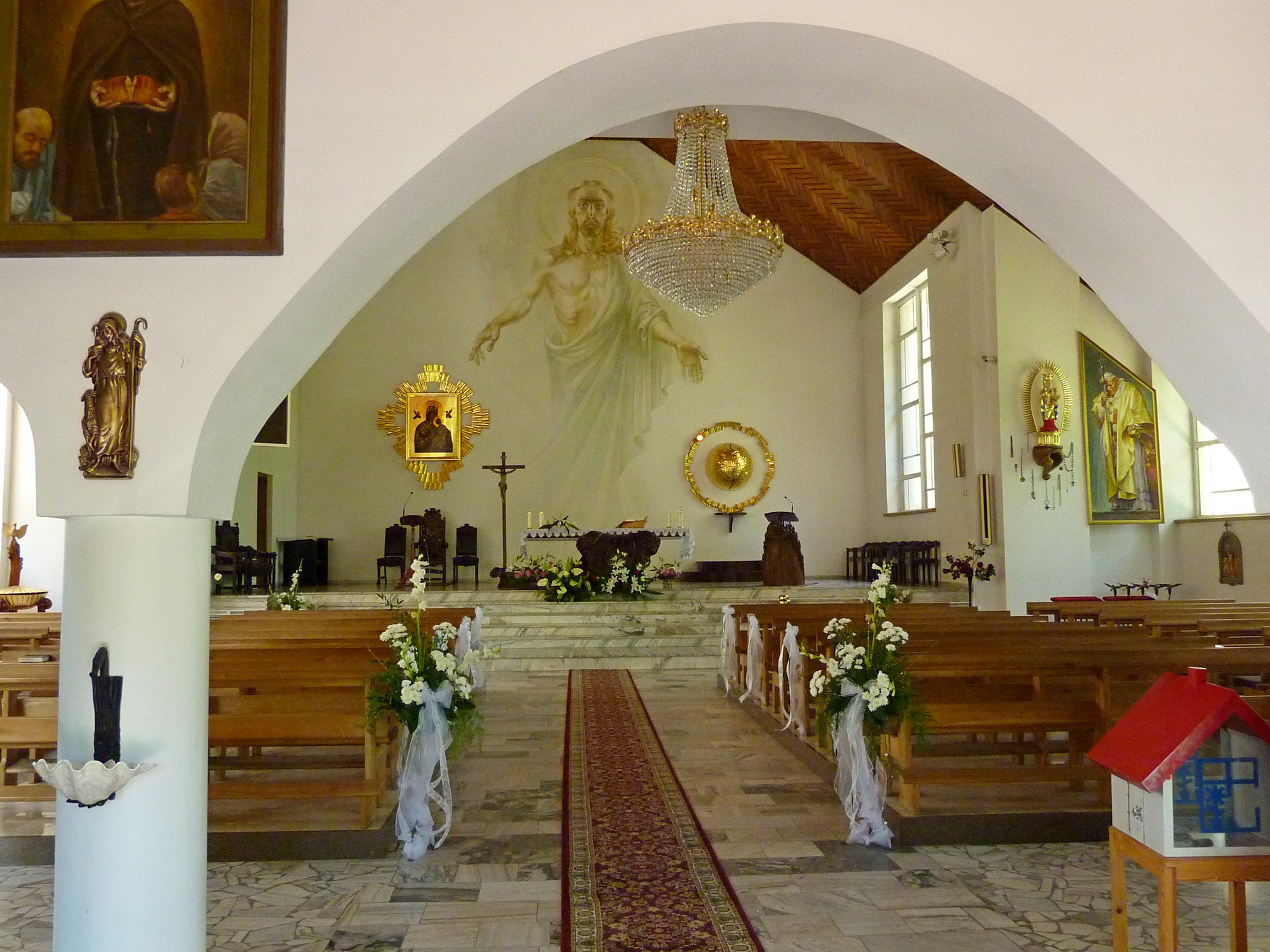 Kościół Matki Boskiej Nieustającej Pomocy w Juracie.